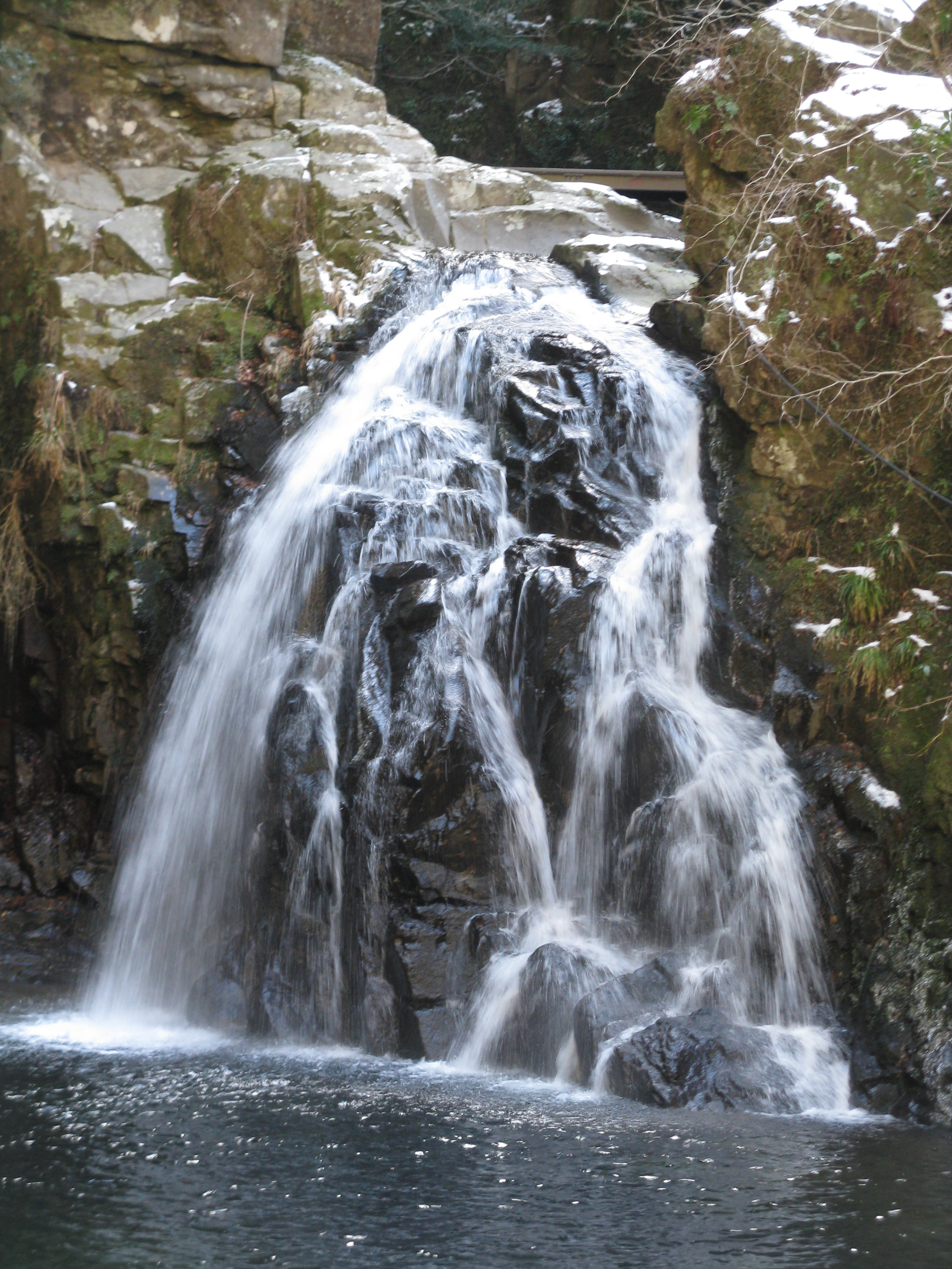 赤目四十八滝の千手滝